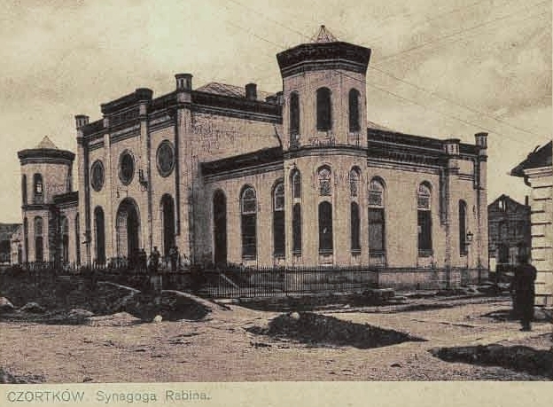 Новая синагога чортковского ребе, построена в 1905 г.